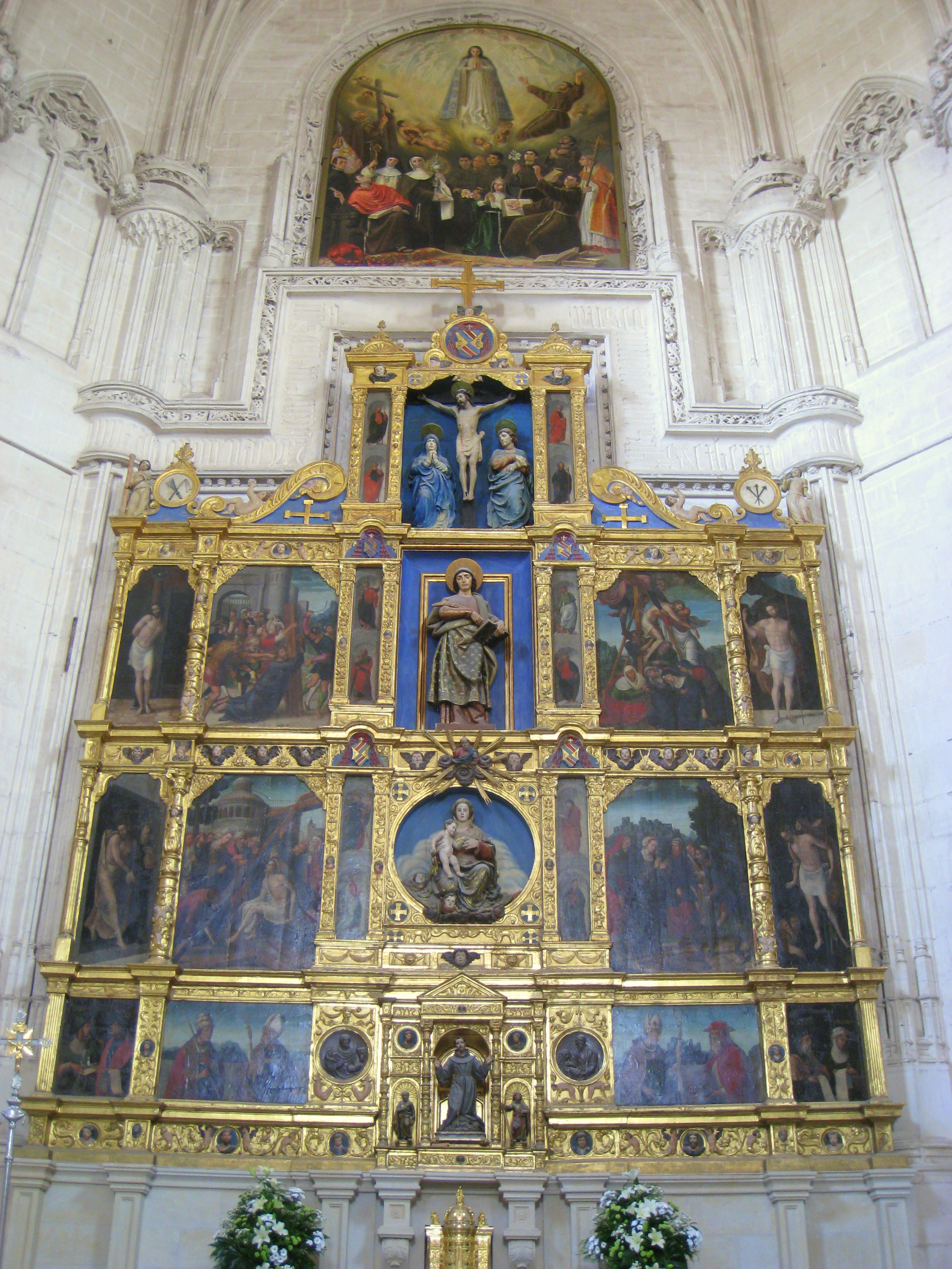 San Juan de los Reyes - Toledo, Spain.